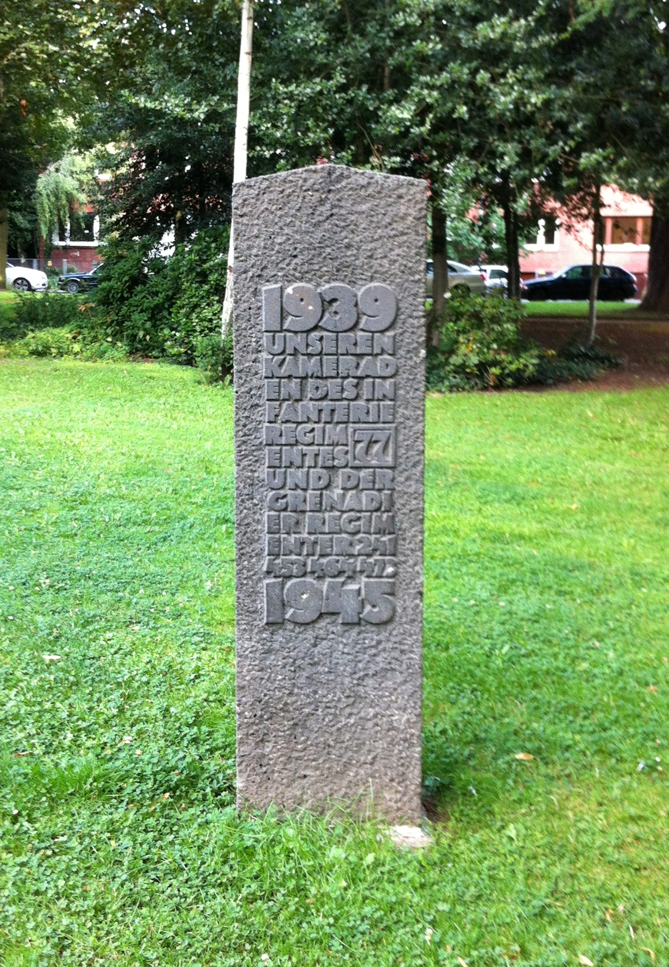 Deutschland, NRW, Bonn, Ortsteil Weststadt, Baumschulwäldchen (nahe Beethovenplatz): Gedenkstätte für Gefallenen des 2. Weltkrieges